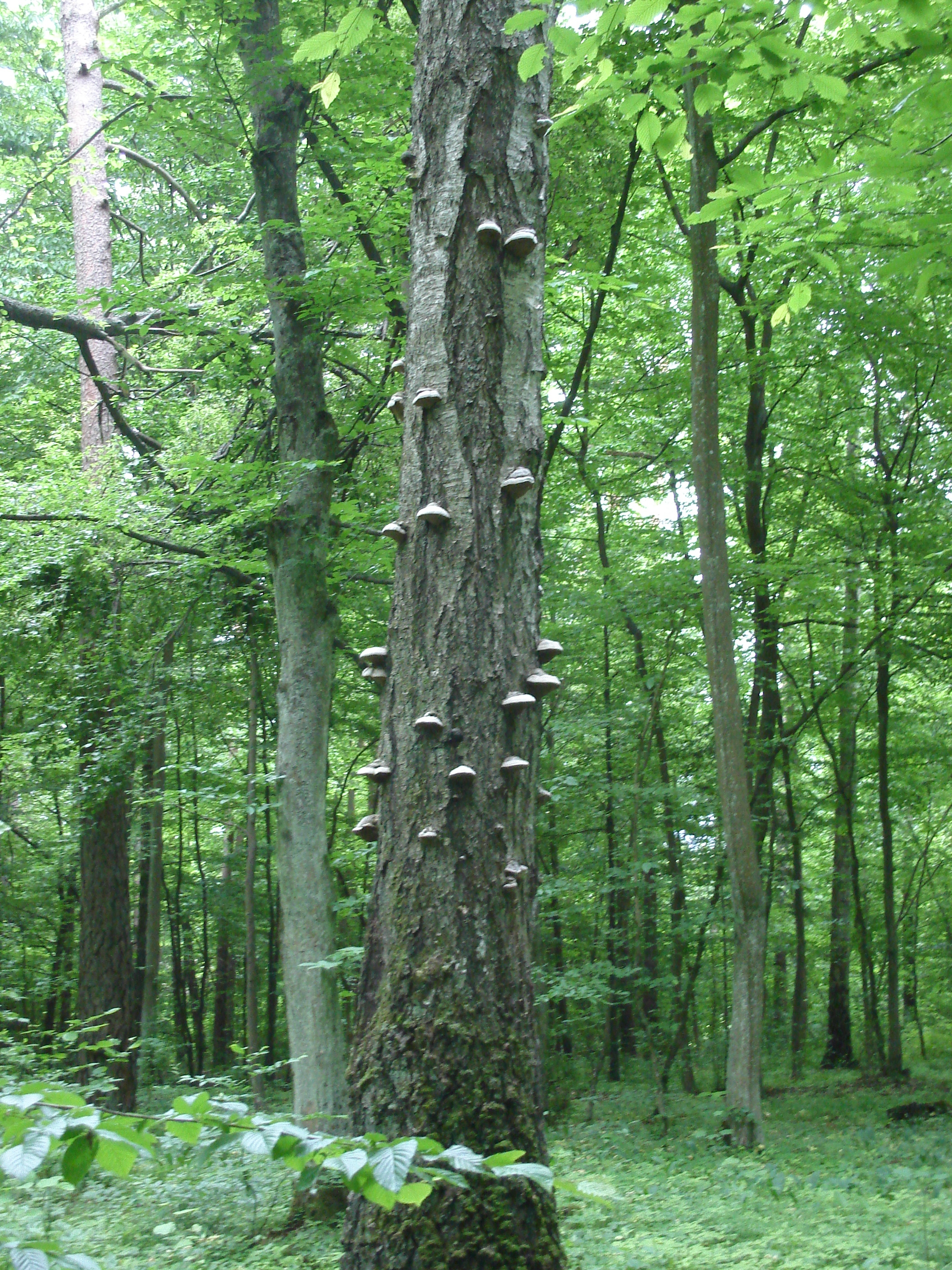 Puszcza Piska - huba na drzewie.